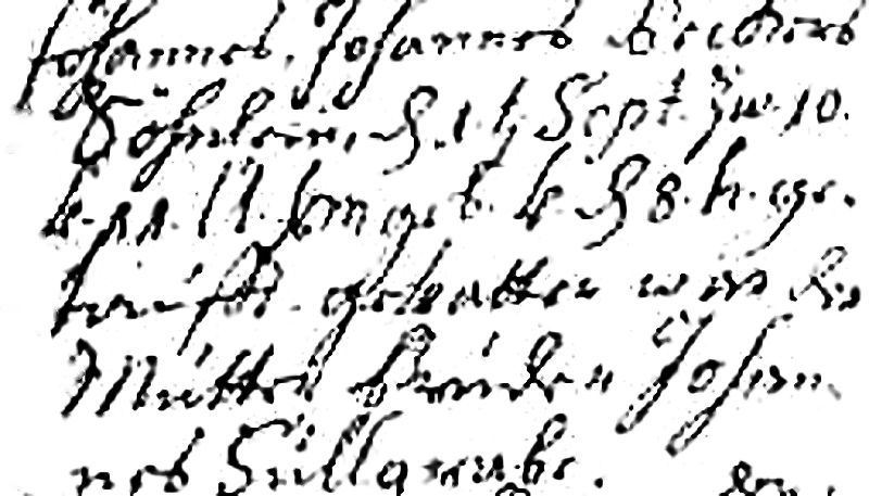 Taufeintrag des Hoforganisten Johannes Becker